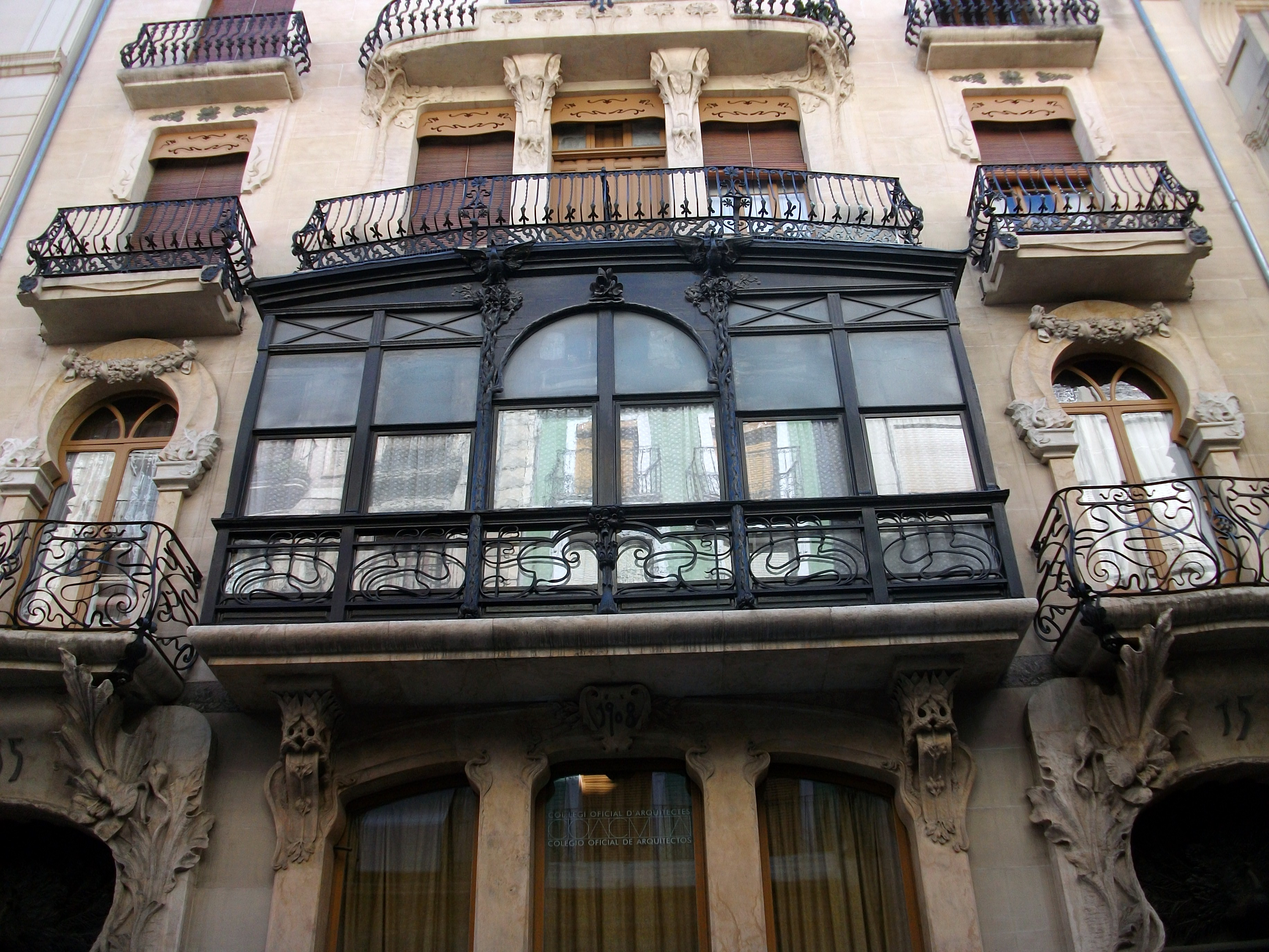 Balcó de la casa del Pavo, Alcoi.